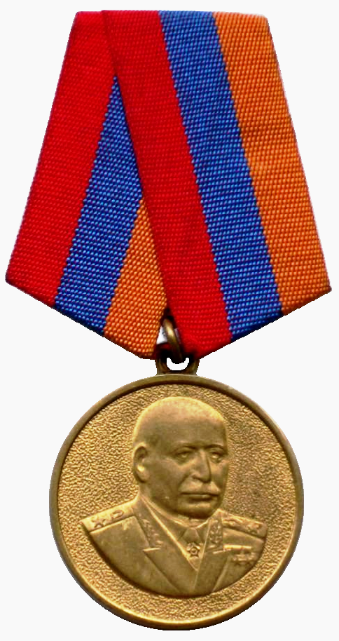 Медаль «Маршал Баграмян»